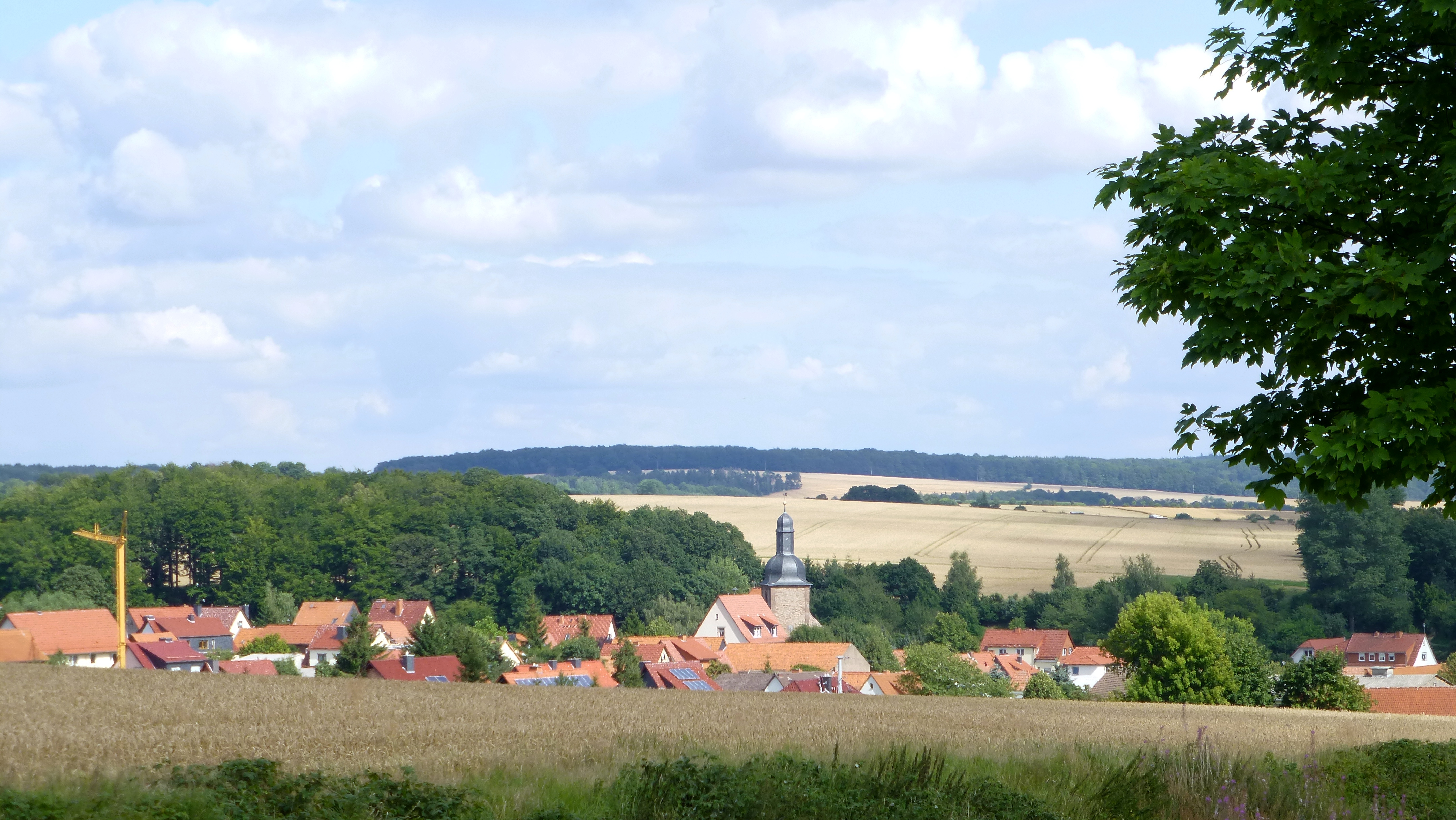 Blick von Westen über Reinholterode